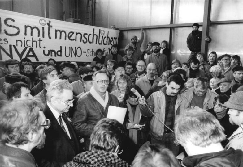 ADN-ZB-Sindermann-2.12.89-Rostock: Als geheimes Waffenversand-Unternehmen entlarvten Einwohner des Landkreises Rostock in Kavelstorf die IMES GmbH, die Handelsbeziehungen zu Ländern in Nahost, Afrika und Südamerika unterhält. IMES-Generaldirektor Gerhardt Wichert (m.) antwortet hier auf Fragen empörter Bürger.